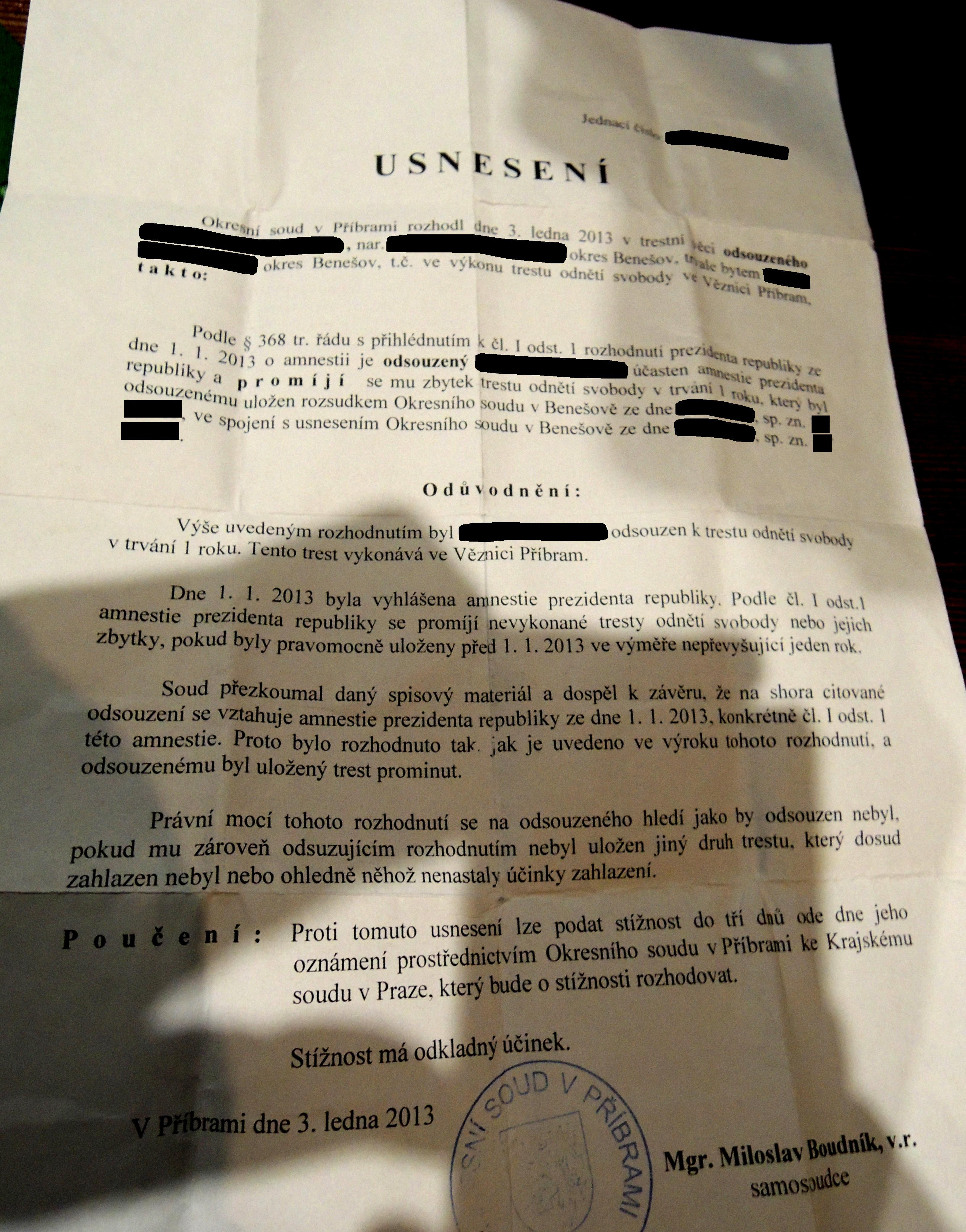 Usnesení o prominutí trestu odnětí svobody na základě amnestie prezidenta republiky vyhlášené 1. ledna 2013. (Osobní údaje byly anonymizovány.)